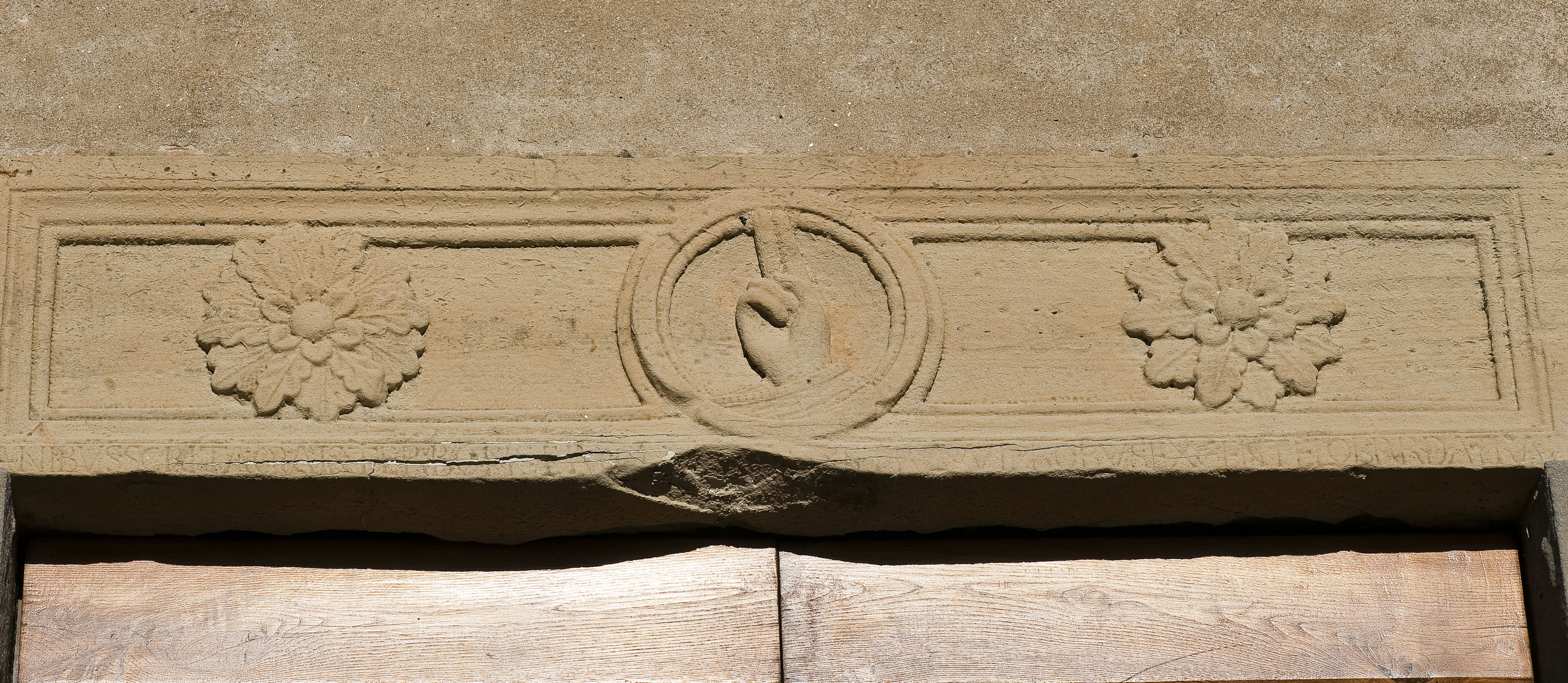 Architrave posto nel portale della pieve di san Giovanni Evangelista a Monterappoli (Empoli) e datato 1165